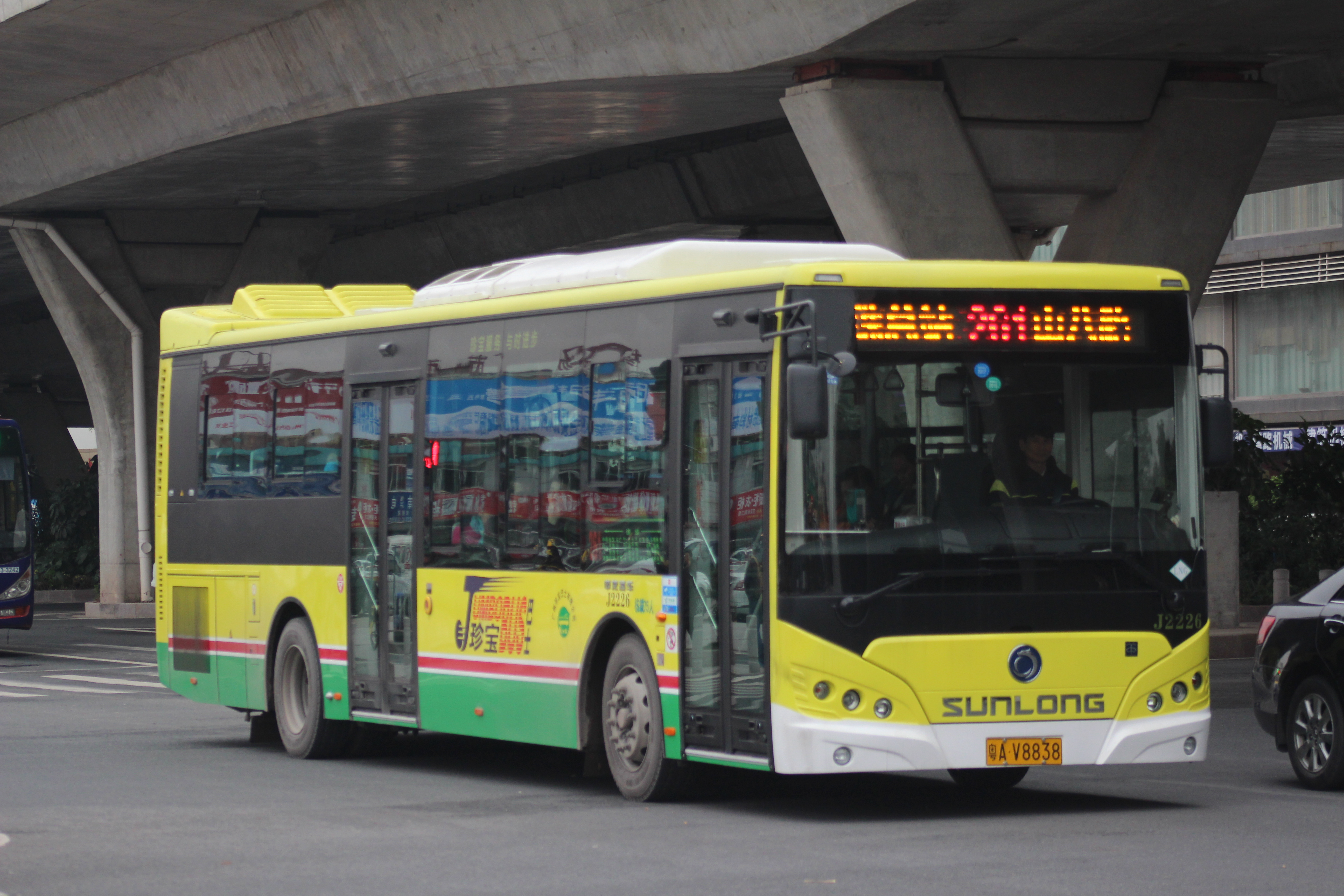 上海申龙客车SKL6119ULN5HEVZ行驶于广州珍宝巴士公司261路